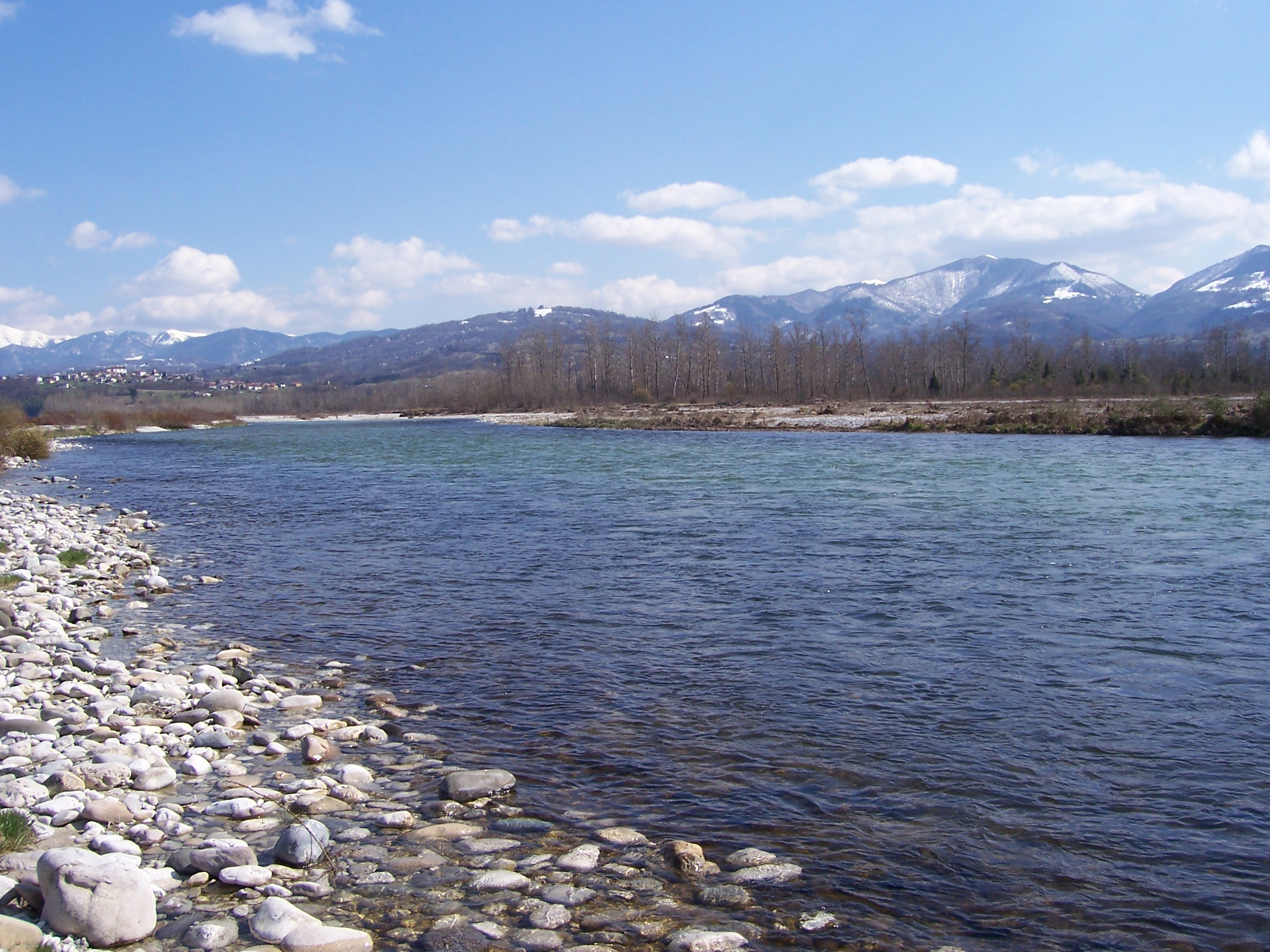 Riva del Piave tra Mel e Santa Giustina